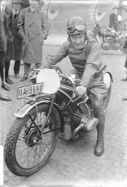 Toni Bauhofer, der bekannte Motorradrennfahrer gewinnt das grosse Kolberger Bäderrennen! Toni Bauhofer, der Sieger des Kolberger Motorradrennens auf B.M.W.